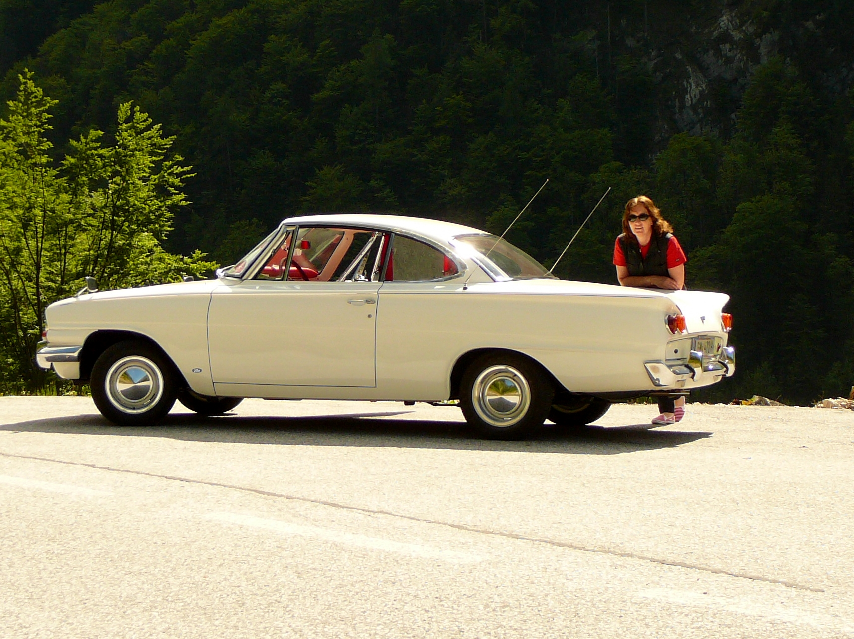 Ausflug Ingrid Sigi Goisern Mitterndorf Obertraun mit Ford Consul Capri am 15-05-2013